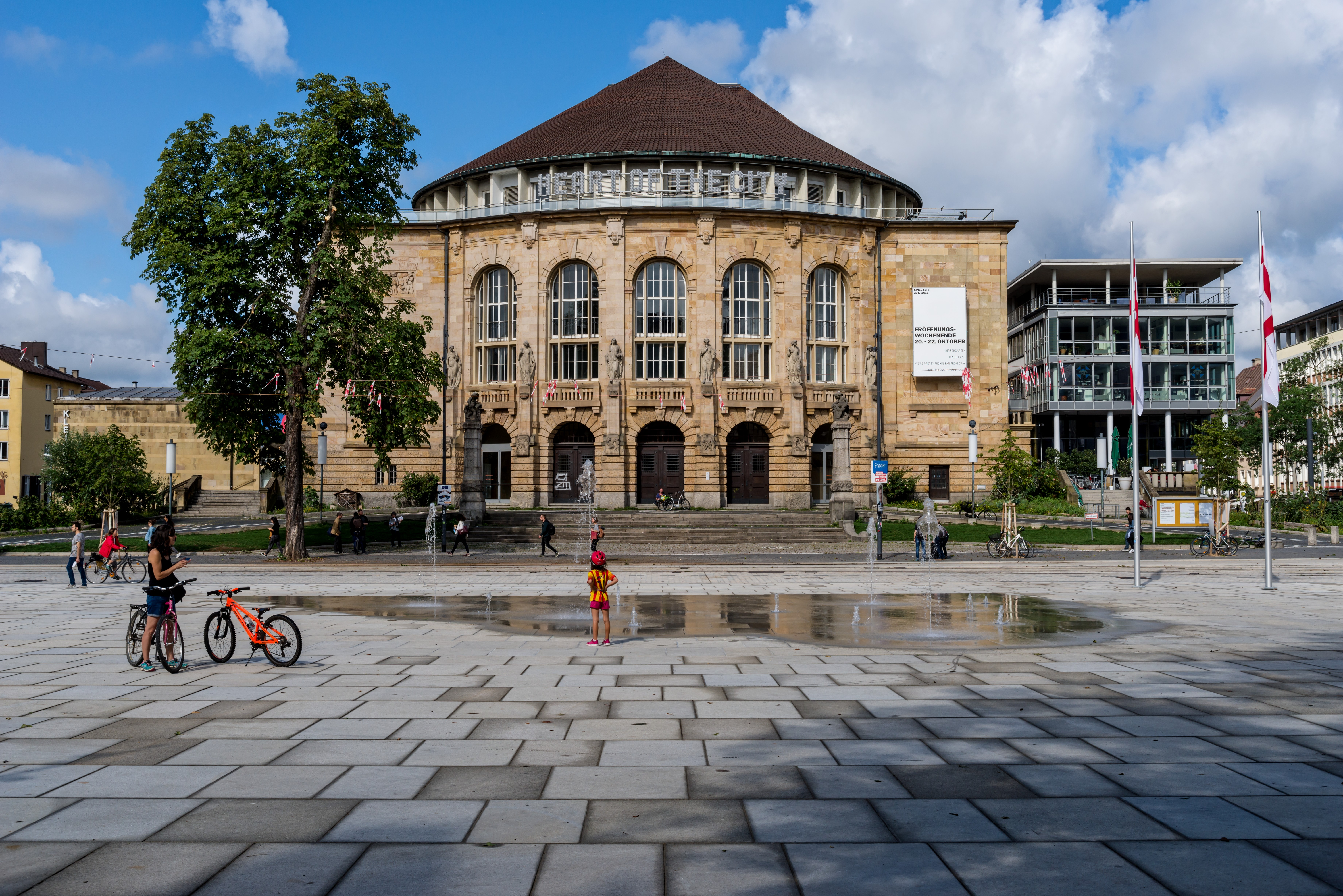 Bilder aus Freiburg im Breisgau Rotteckring, Platz der Synagoge